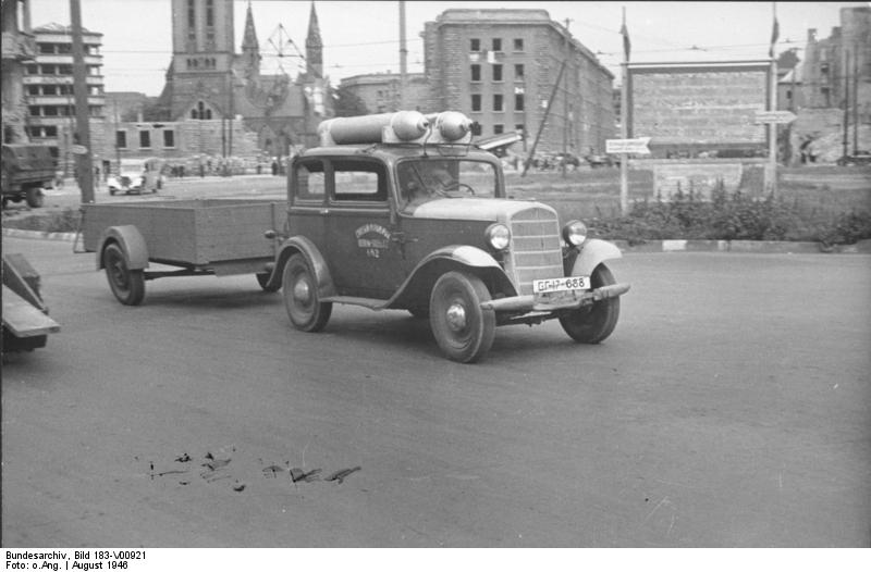 Berlin, Mit Gas angetriebener Pkw ADN-ZB/SNB Mit Gas angetriebener Pkw auf dem Berliner Alexanderplatz. Aufn. Aug. 1946